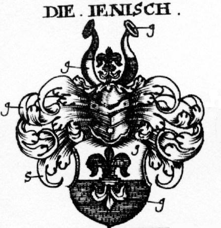 Wappen der alten ursprünglich augsburgischen Patrizierfamilie Jenisch (folgend zu Kempten, Memmingen und Hamburg)- gemäß kaiserlichem Wappenbrief Antwerpen 18. Februar 1503 (nur das dort die beiden Büffelhörner der Helmzier von Gold und Schwarz einfach geteilt -und nicht übereck geteilt- waren).